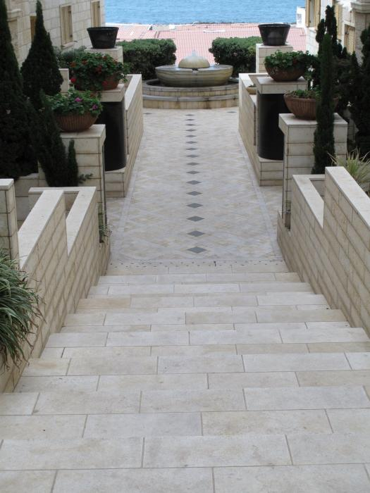 גבעת אנדרומדה היא שכונת מגורים סגורה ויוקרתית ברחוב לואי פסטר ורחוב יפת ביפו. השכונה נמצאת מעל נמל יפו, והכניסה אליה היא מרחוב יפת